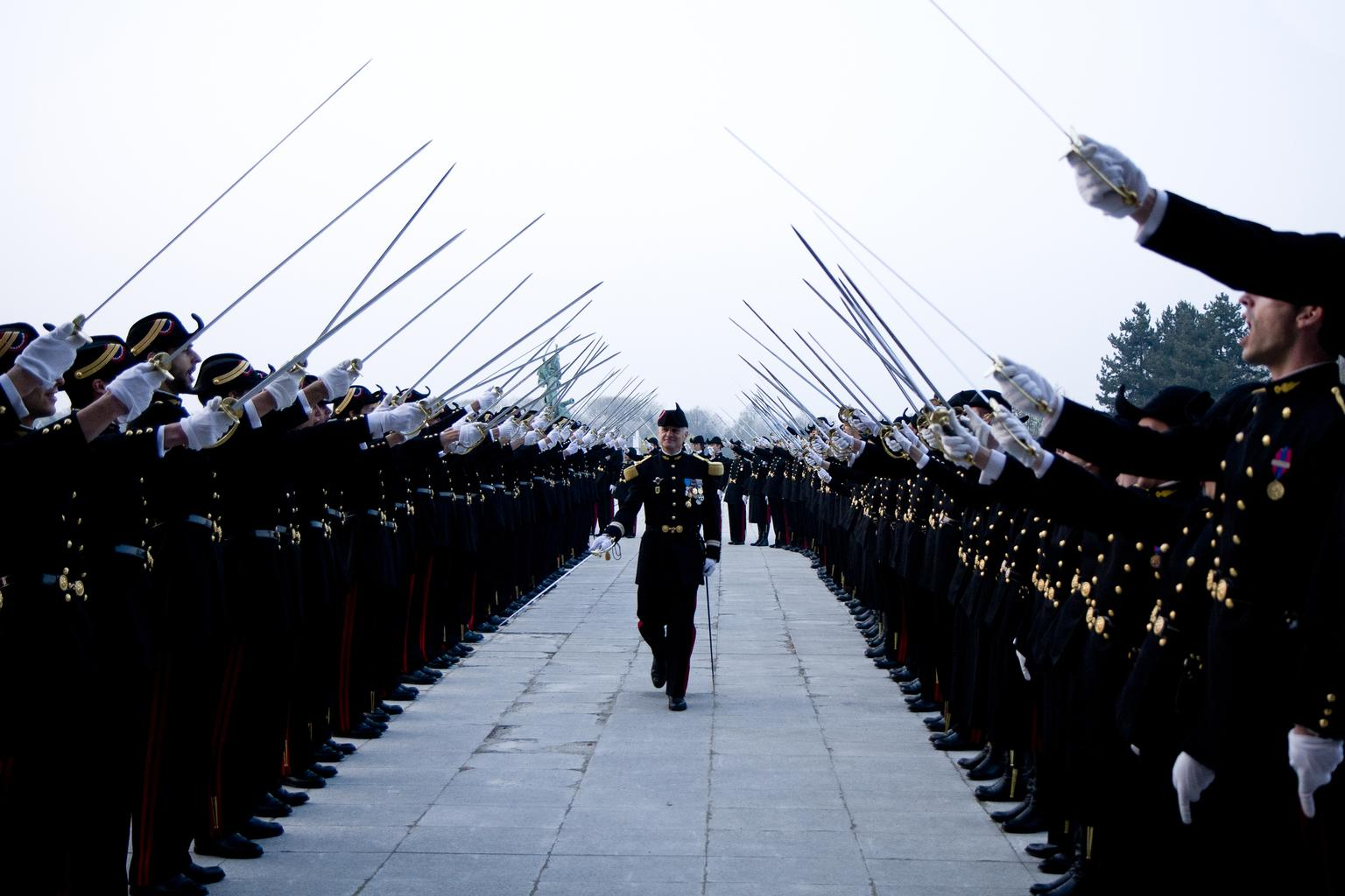 École polytechnique, haie d'honneur, lors du départ de la promotion X 2009.